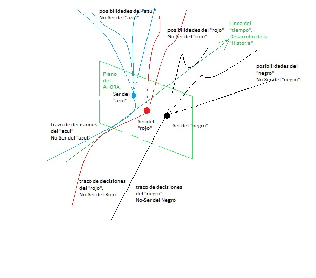 cuerdas pasadas y futuras no Reales